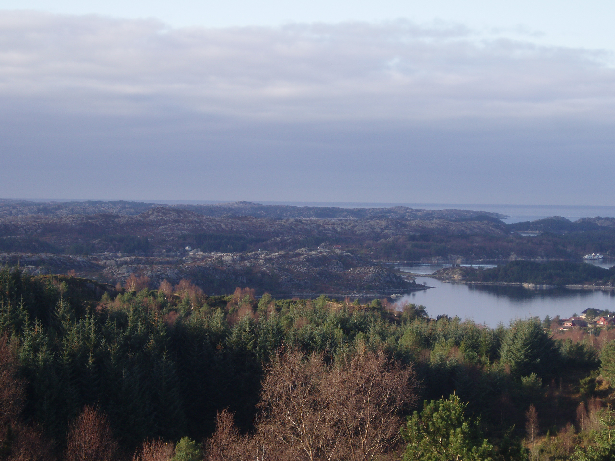 Fitjarøyane sett frå Storhaugen. The Fitjar Isles seen from Storhaugen.